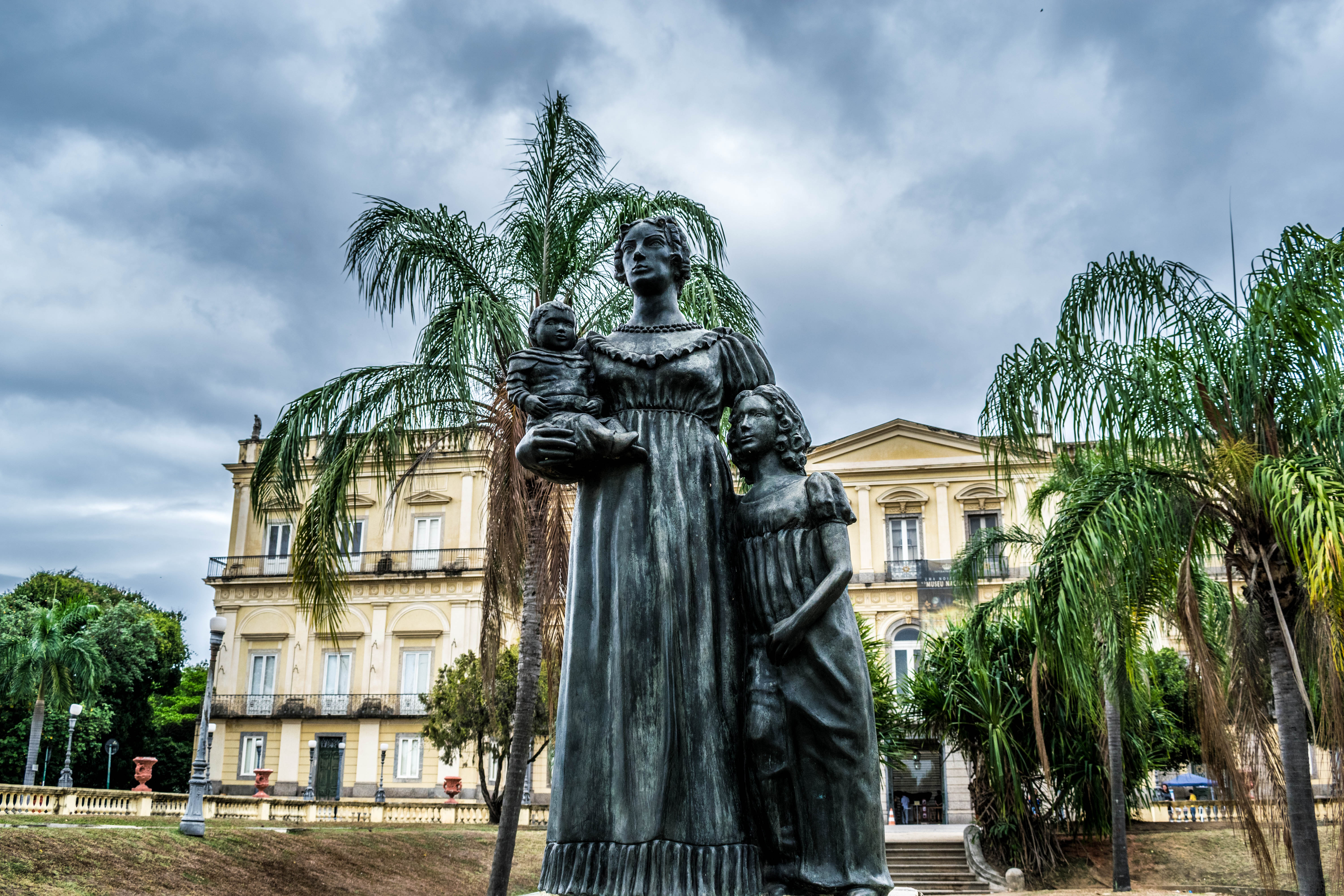 Museu Nacional, inclusive a Coleção Arqueológica Balbino de Freitas